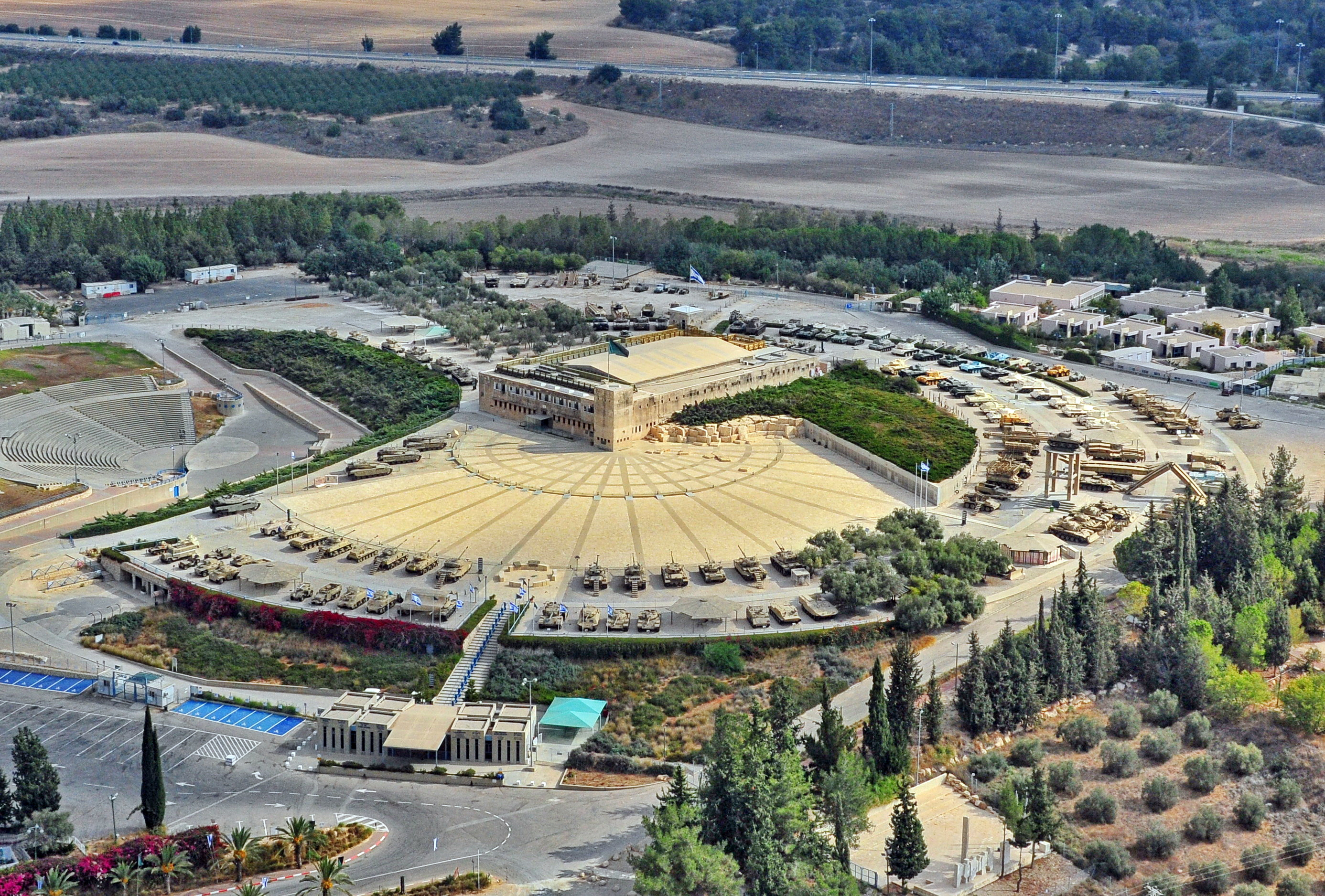 אתר הנצחה לחללי חיל השריון במערכות ישראל. האתר כולל מוזיאון לתולדות השריון ואוסף של טנקים ורכב קרבי משוריין. האתר נמצא בלטרון שבעמק איילון, במצודת טגארט של משטרת לטרון שהקימו שלטונות המנדט הבריטי בשנת 1940.